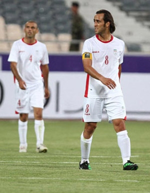 دیدار تدارکاتی تیم های فوتبال ایران و ماداگاسکار / ایران ۱ - ماداگاسکار ۰ / تیر ۱۳۹۰